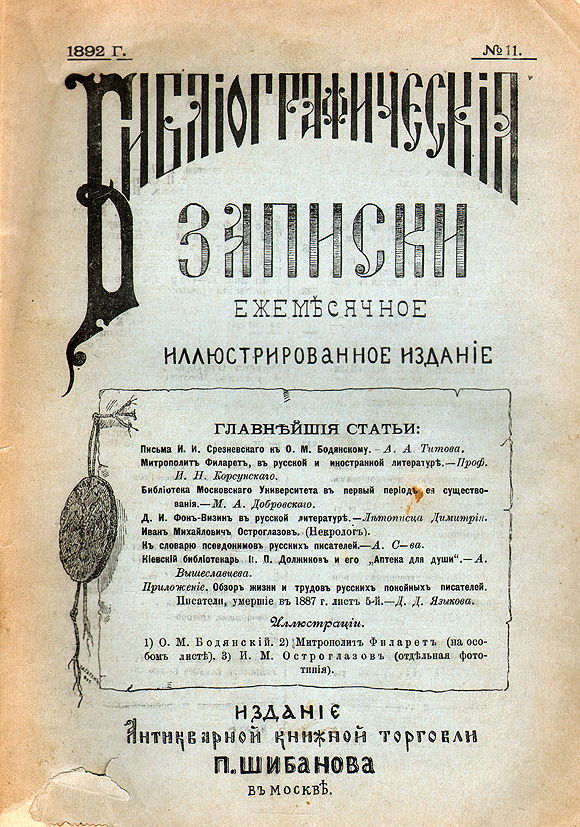 Bibliographic Annales, 1892